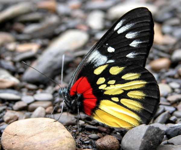 Redbase Jezebel (Delias aglaia) at Jairampur, Arunachal Pradesh, India.